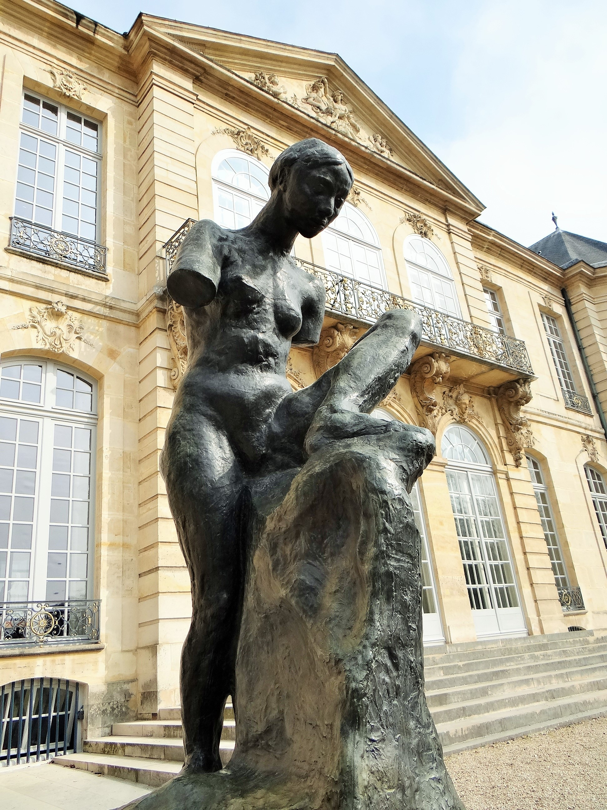 Muse Whistler de Rodin devant l'hôtel Biron, musée Rodin, Paris